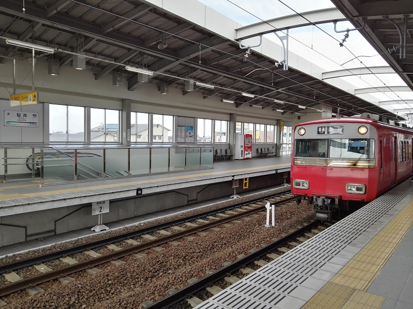 Sakurai station platform